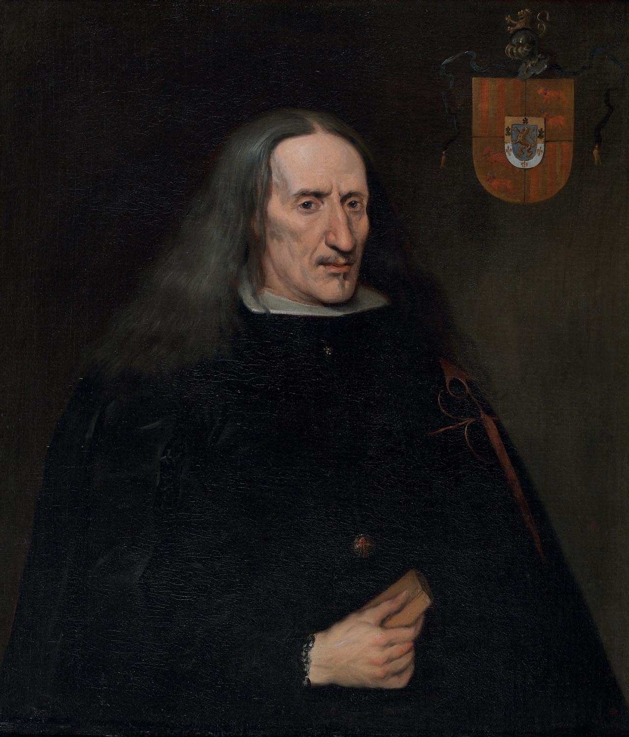 Retrato del historiador, filólogo, genealogista y poeta español José Pellicer de Ossau Salas y Tovar (1602-1679), que también llegó a ser caballero de la Orden de Santiago y cronista mayor de los reinos de Castilla y Aragón.